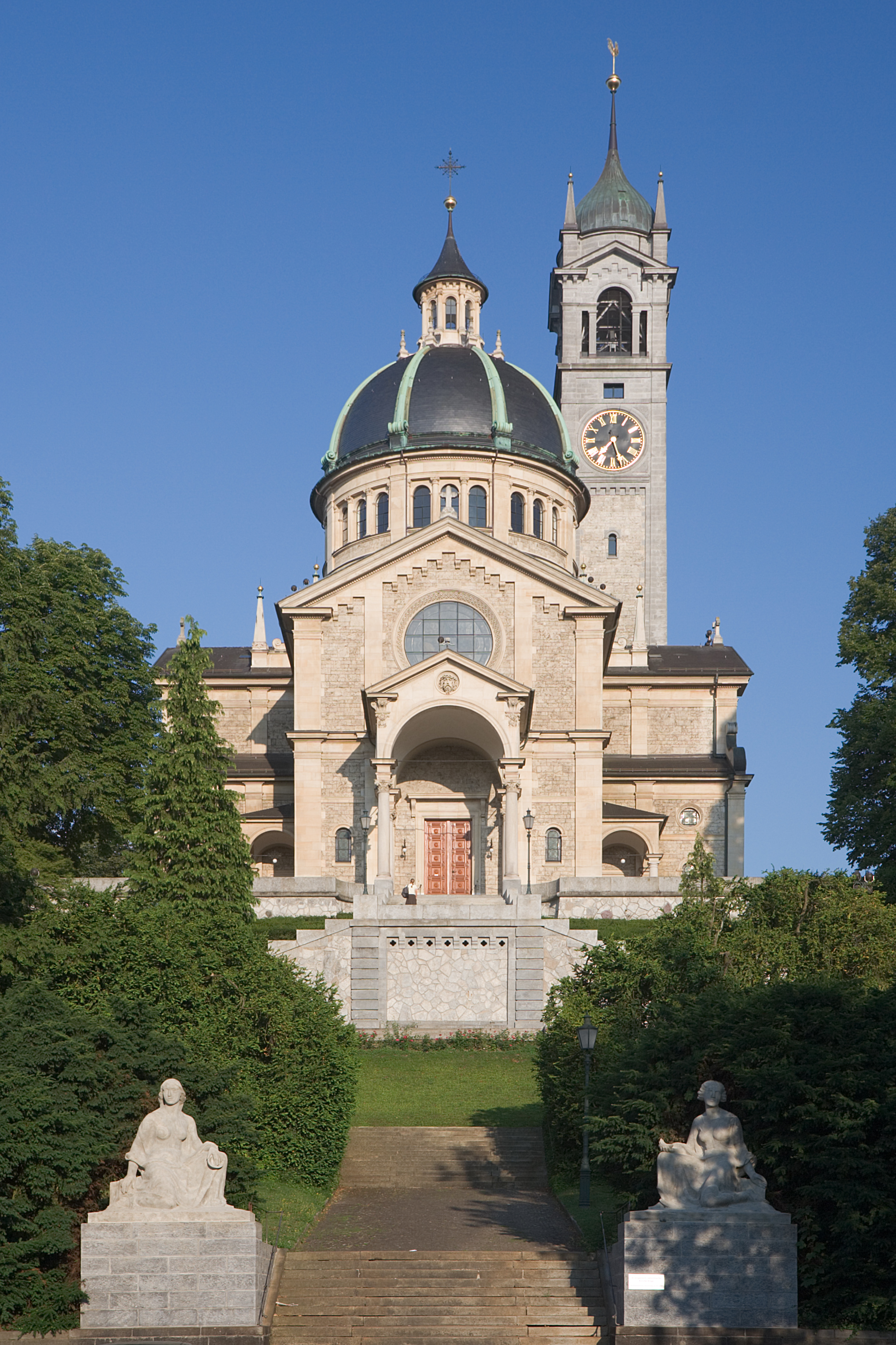 reformierte Kirche Enge, Zürich, Schweizerbaut von Alfred Friedrich Bluntschli